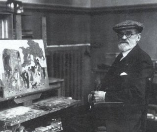 Fotografía del pintor Pedro Figari (1861 - 1938), maestro del impresionismo uruguayo.